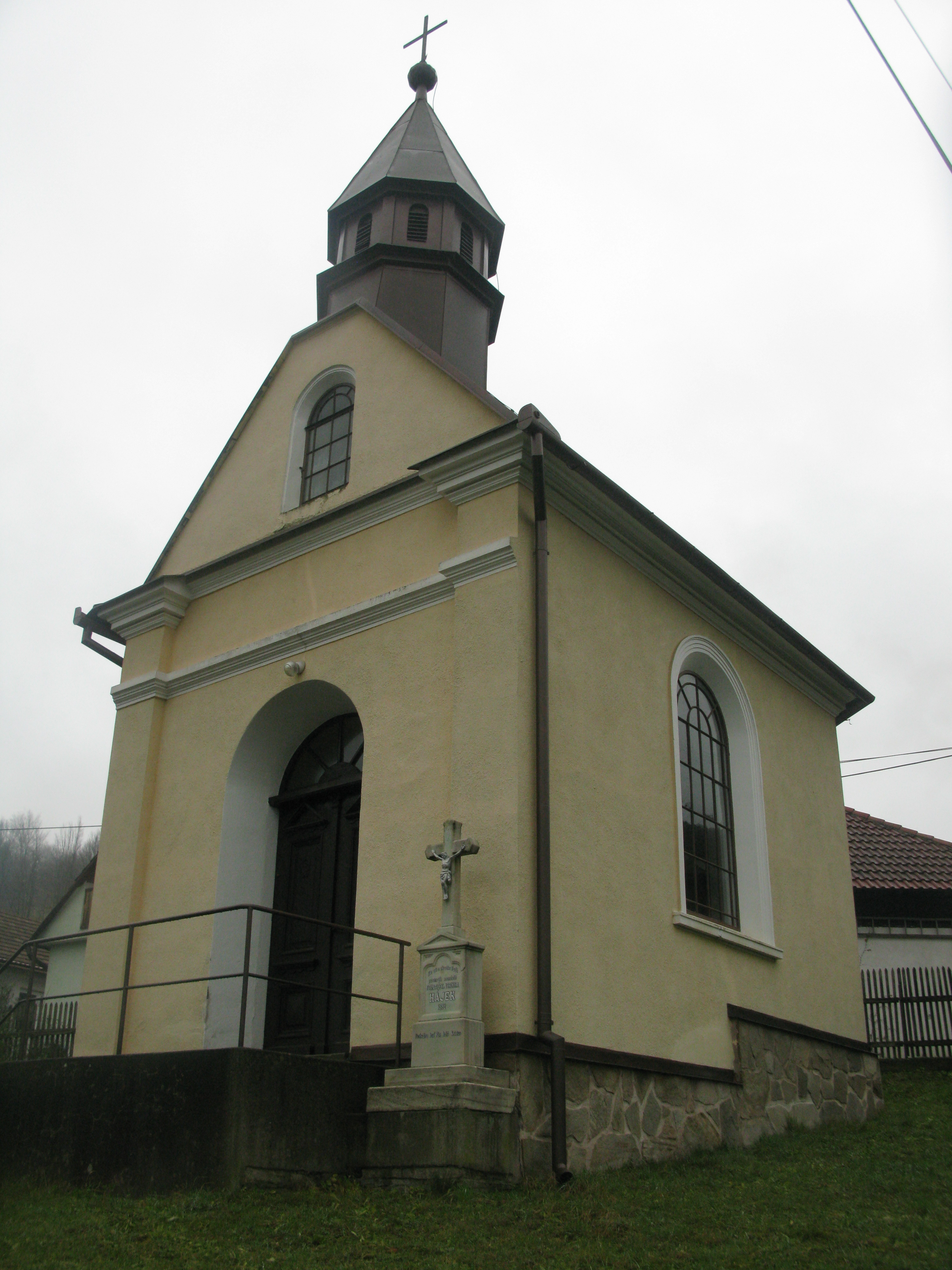 Pohled na kapli zprava zepředu